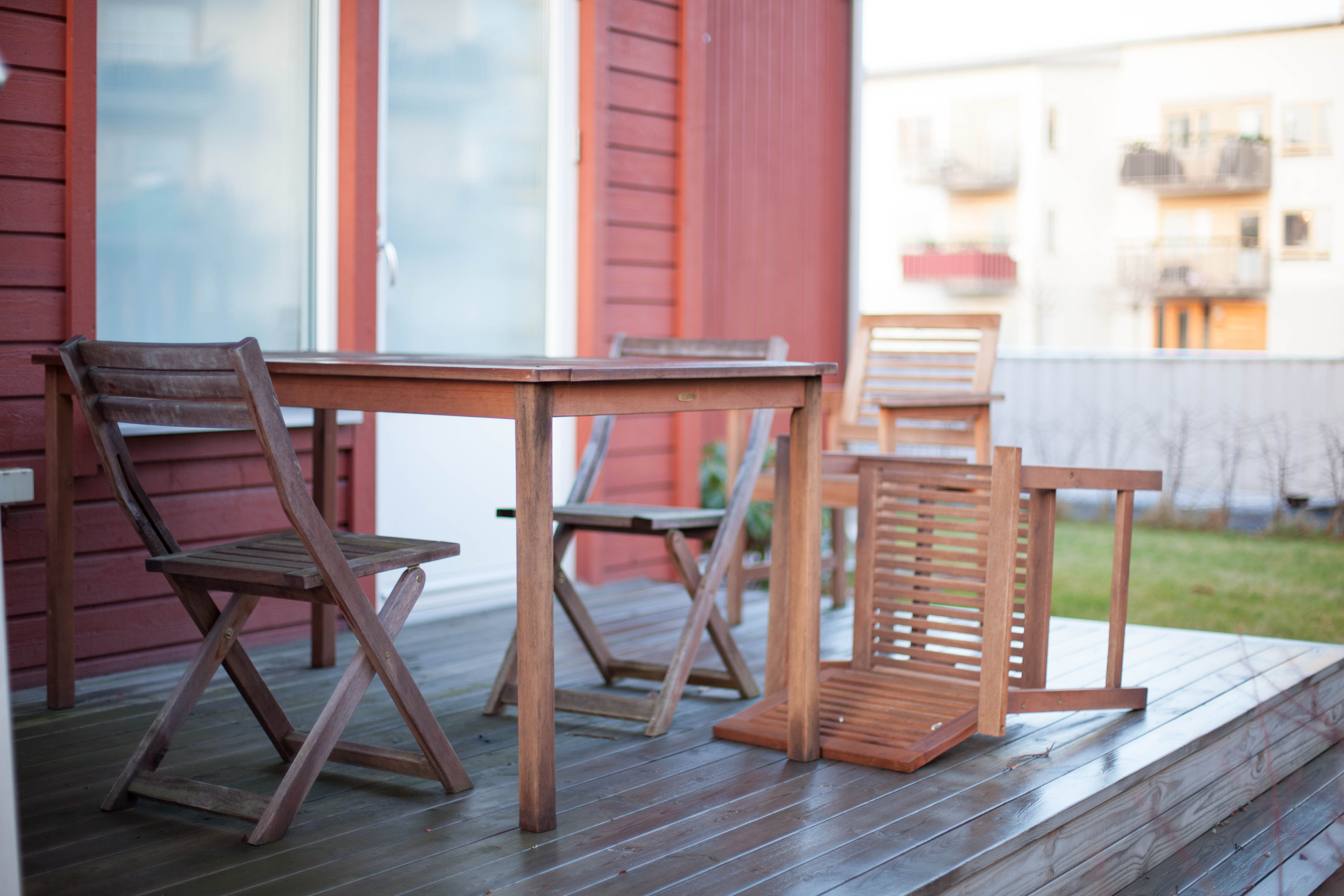 Övergivna utemöbler